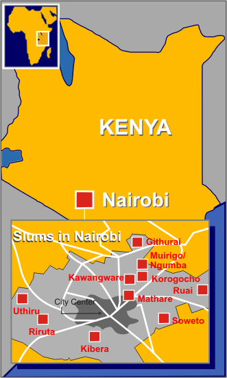 Nairobi major slums